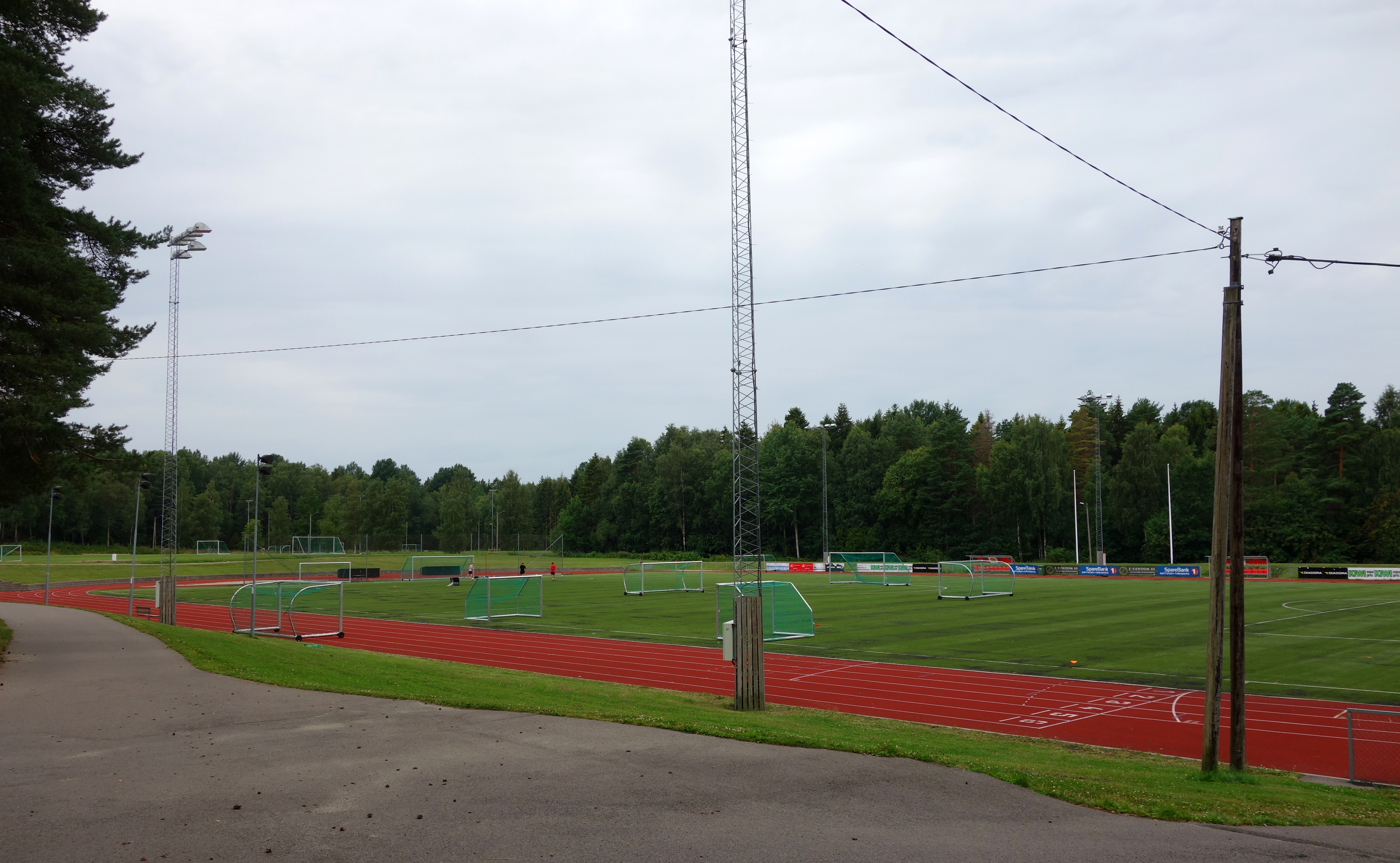 Nesskogen idrettspark på Nøtterøy